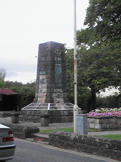 Dinas Powys war memorial